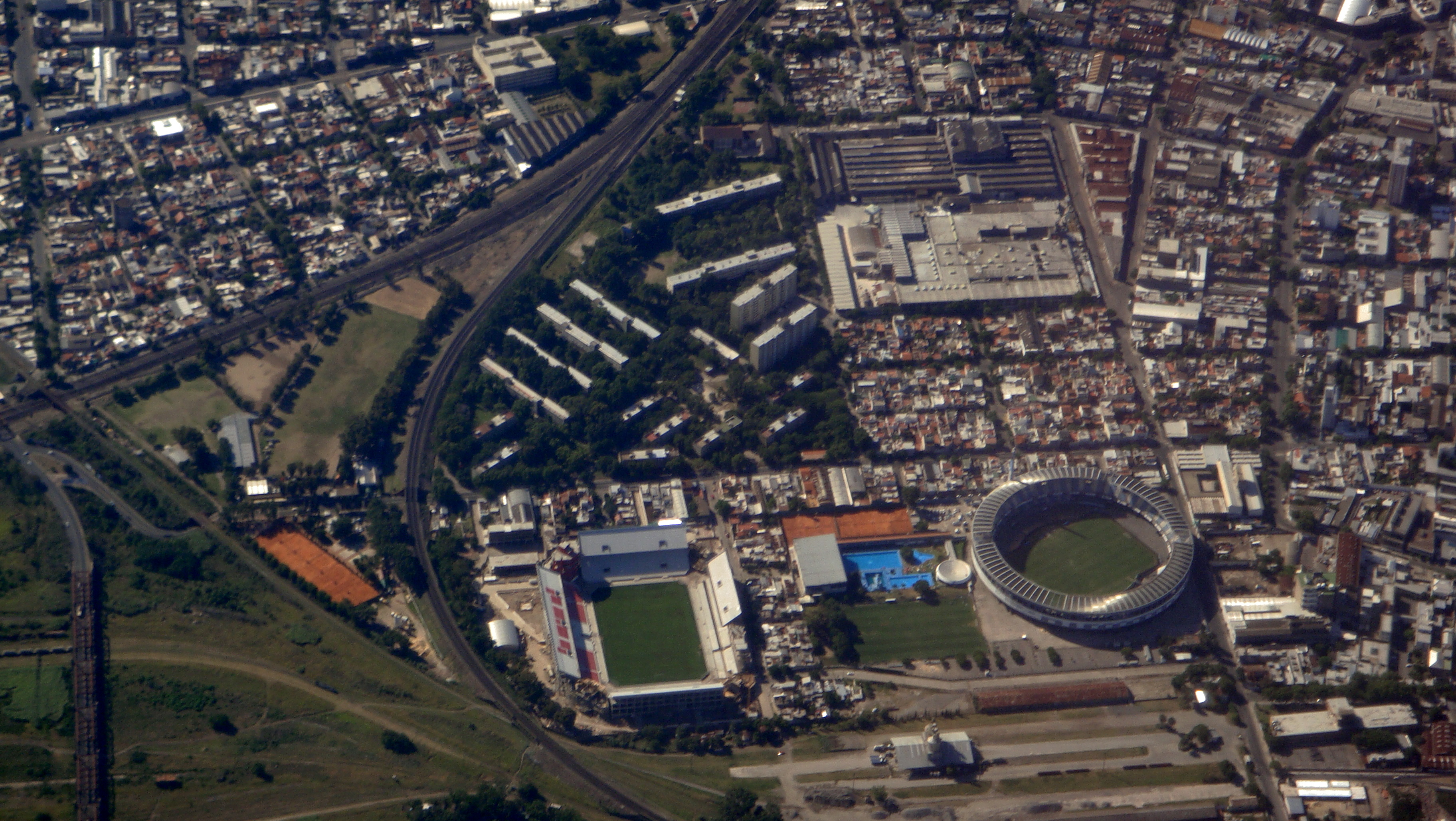 Canchas de futbol del club Independiente y Racing, a no mas de 3 cuadras de distancia.